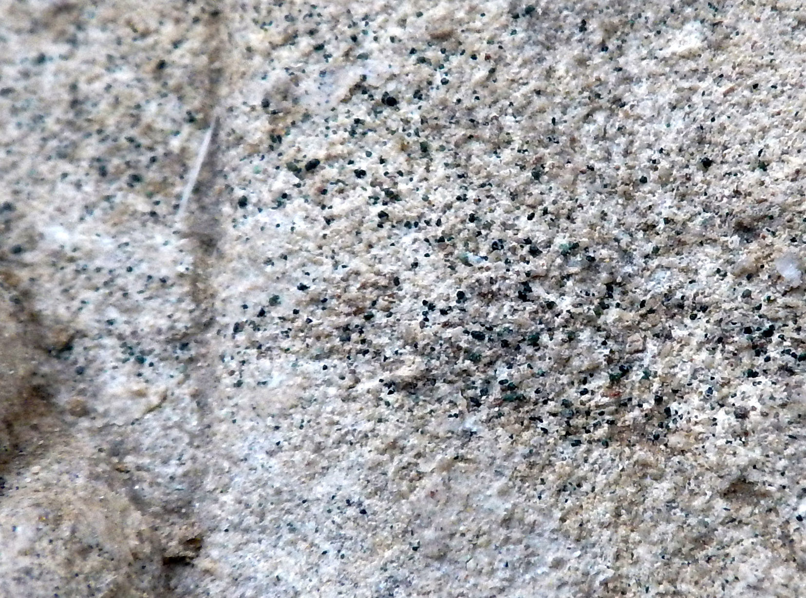 Les points noirs (en réalité vert-noir) visibles sur la photo sont des cristaux glauconiaux (de glauconies) qui indiquent que la pierre calcaire de cette sculpture vient probablement des carrières de pierre de Hordain situées dans l'Avesnois (dans le département du Nord, dans l'actuelle Région Hauts-de-France)